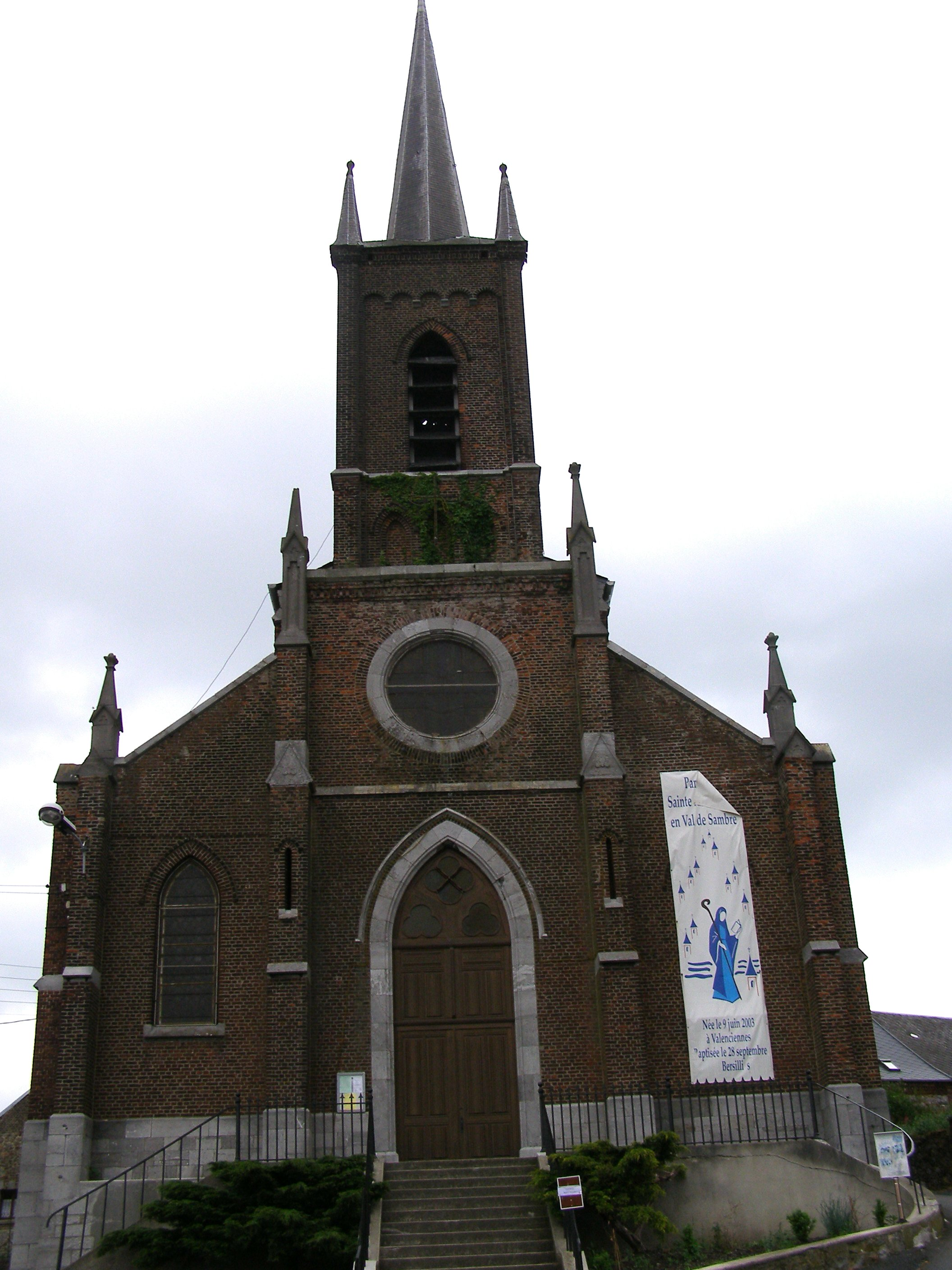 L'église Saint-Vaast